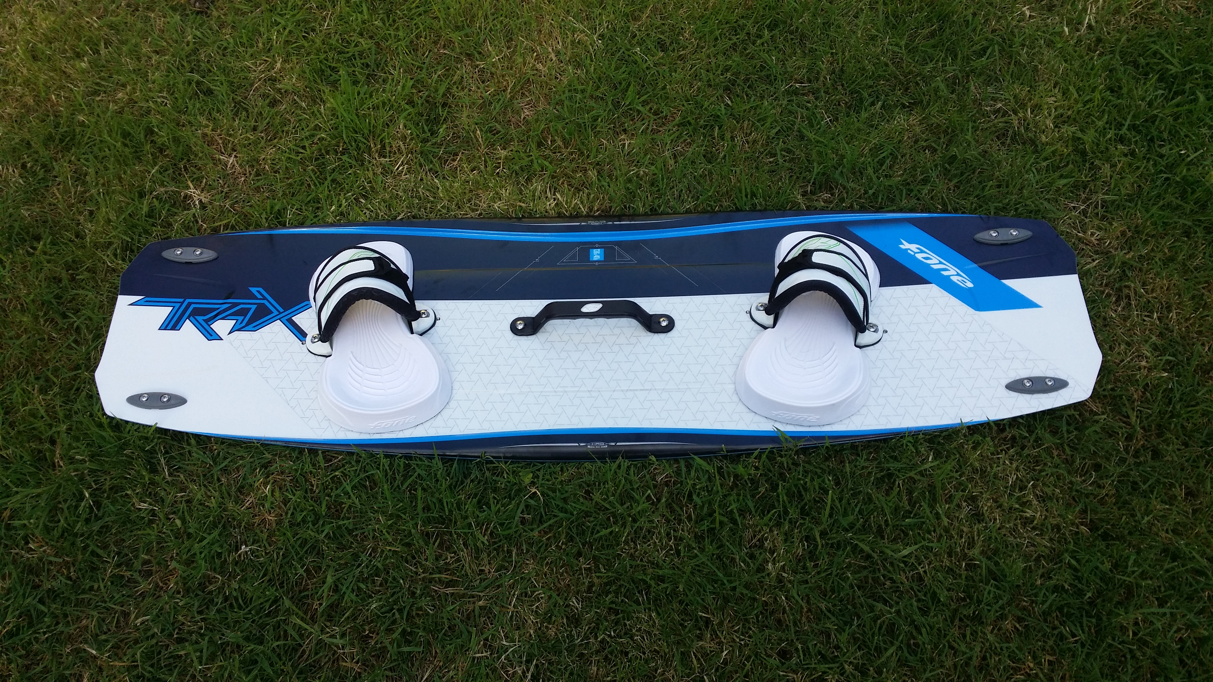 année 2014 type twin-tip face superieur